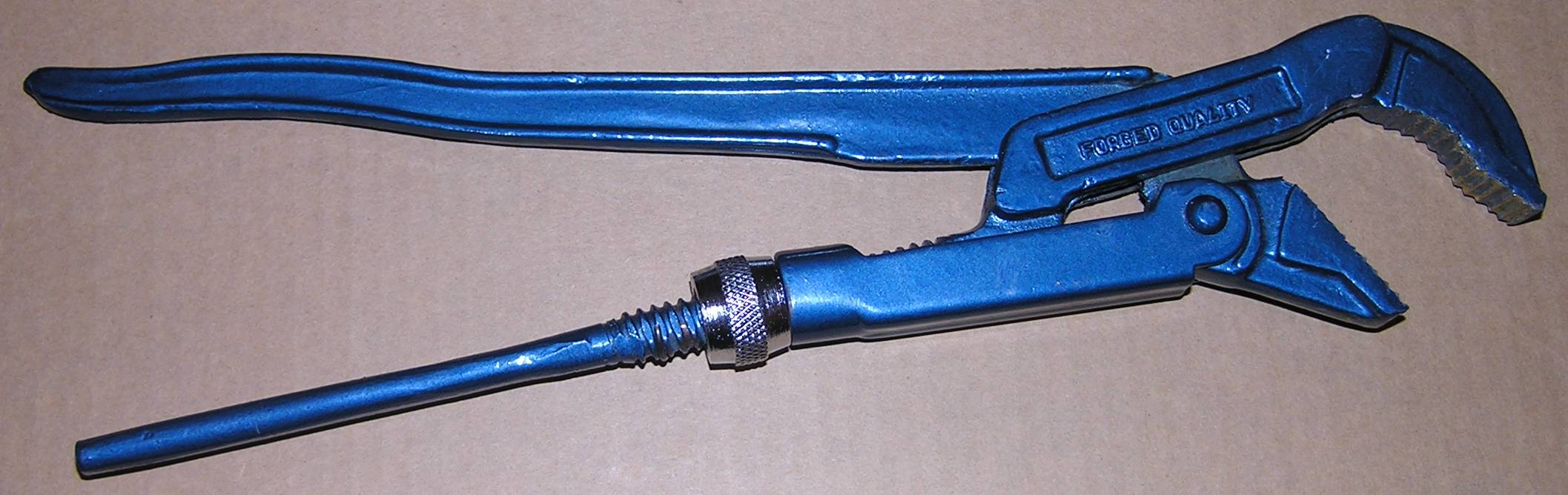 Plumber key. Photo by Audrius Meskauskas.